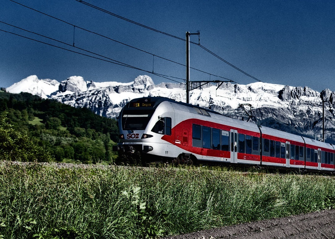 Flirt der Südostbahn unterwegs auf der Ringlinie S4 bei Buchs SG